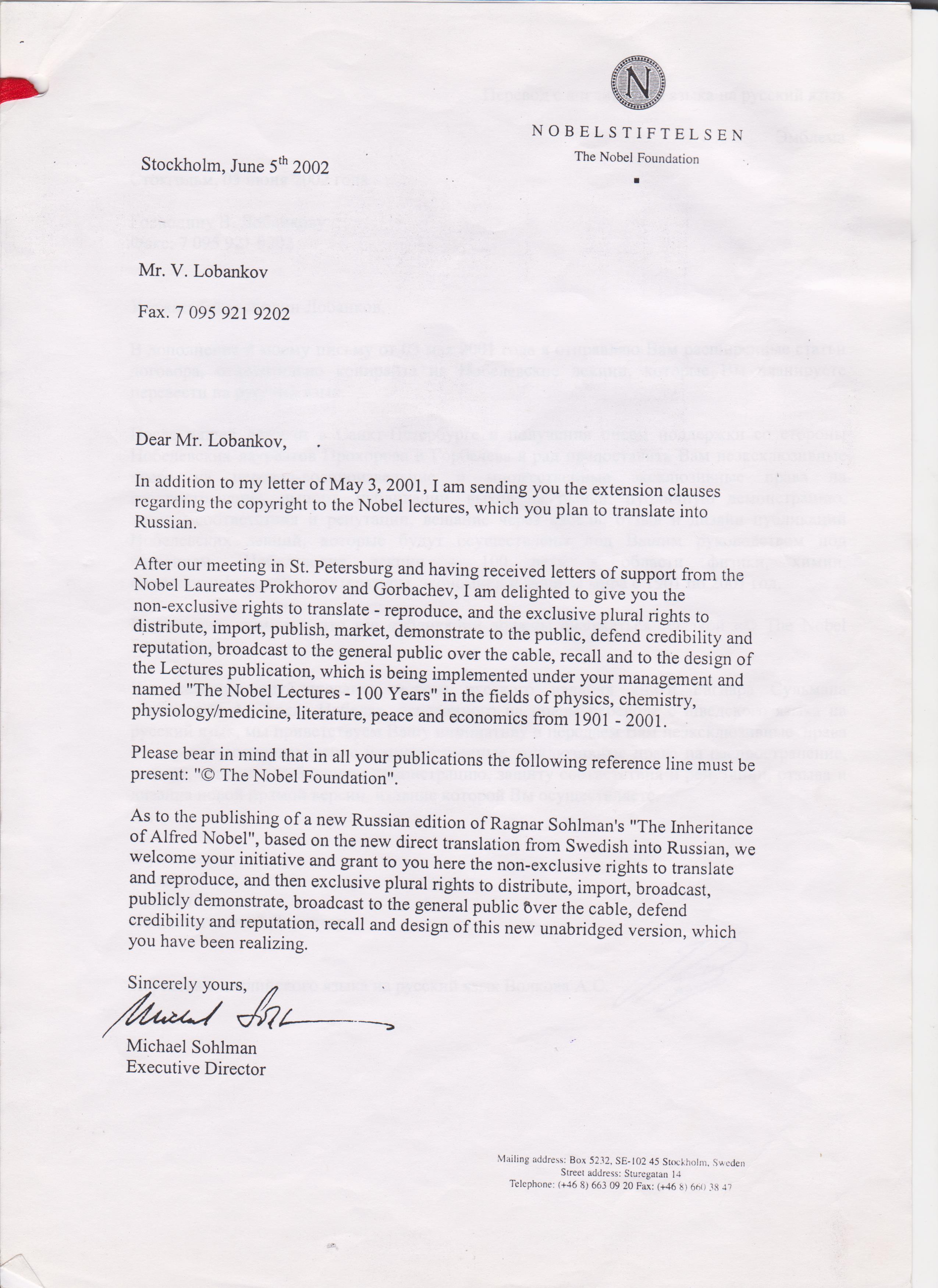 Письмо ("Копирайт") от Микаэля Сульмана В.С.Лобанкову, Нобелеские лекции на русском языке.